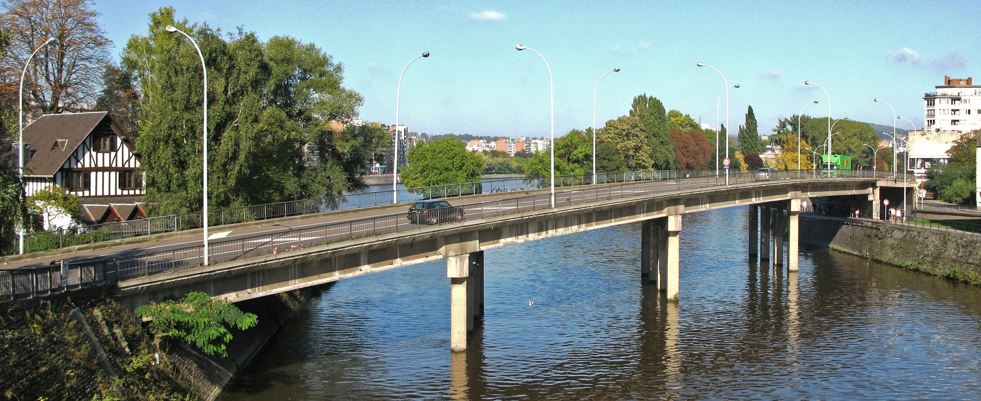 Bréck Lëck.